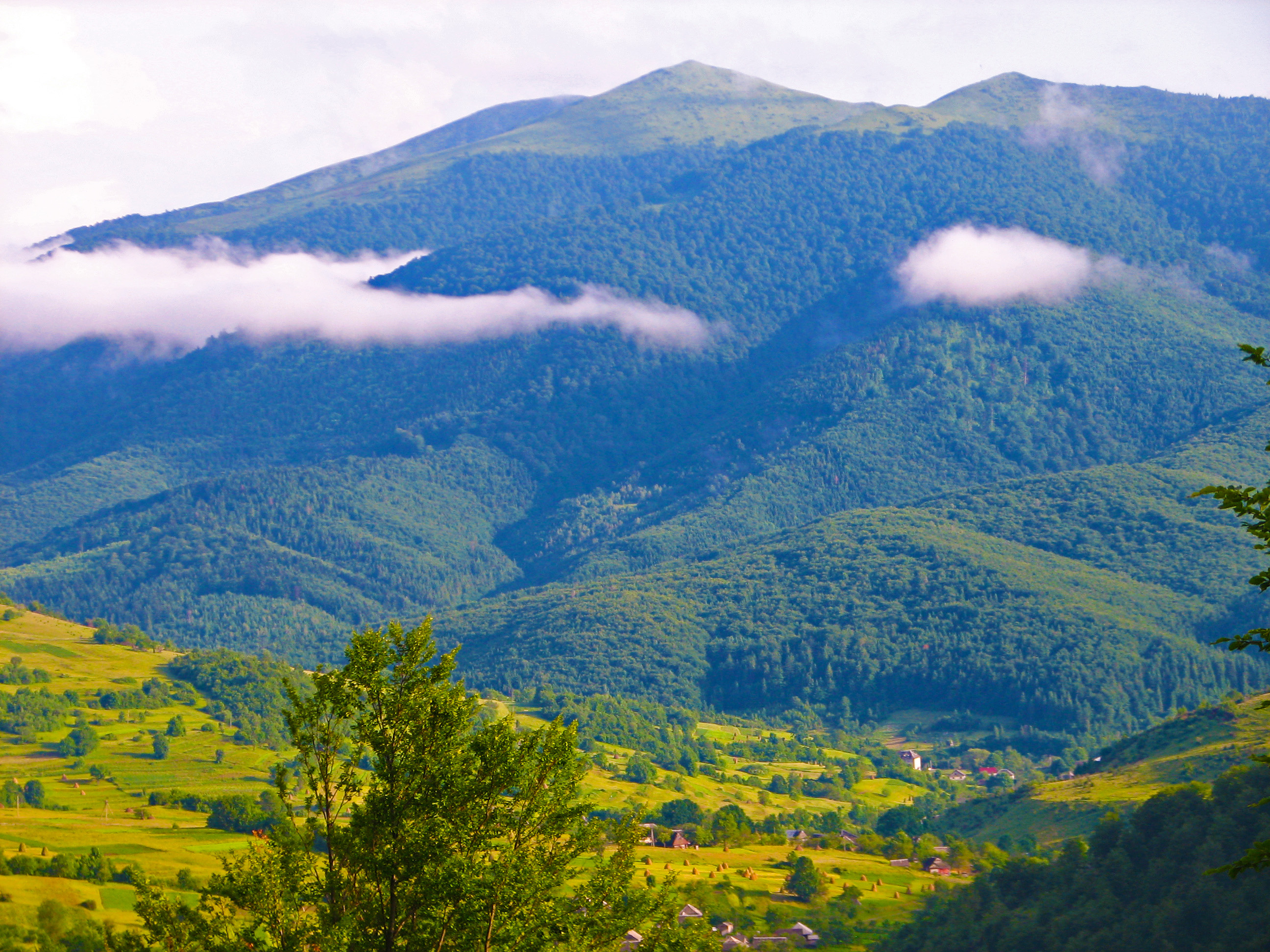 «Пікуй», Воловецький р-н, ДП «Воловецьке ЛГ», Пашківське л-во квартал 20, Нижньоворітське квартал 2, 5, Підполозьське л-во квартал 6